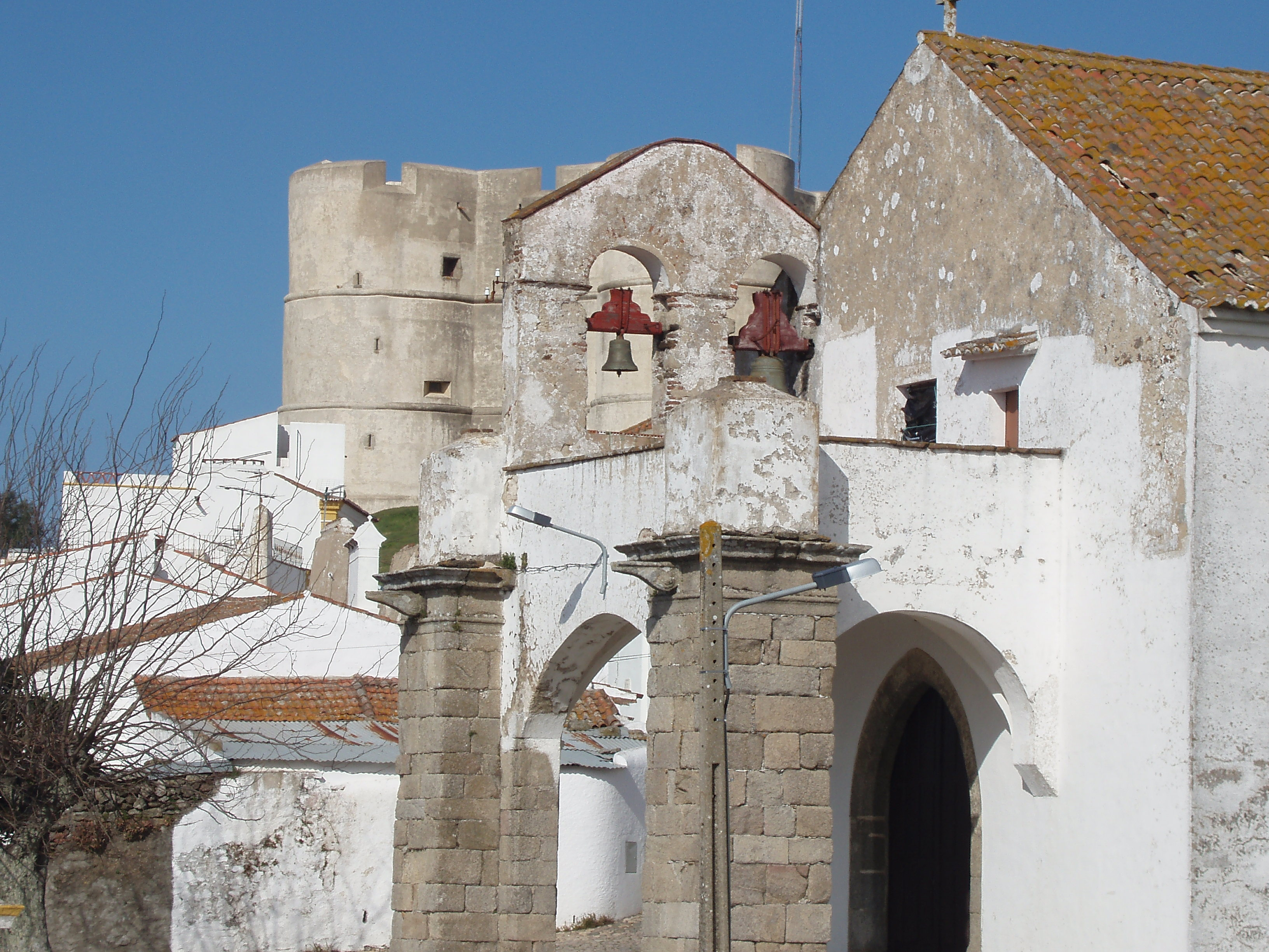 Igreja de Santa Maria de Evoramonte